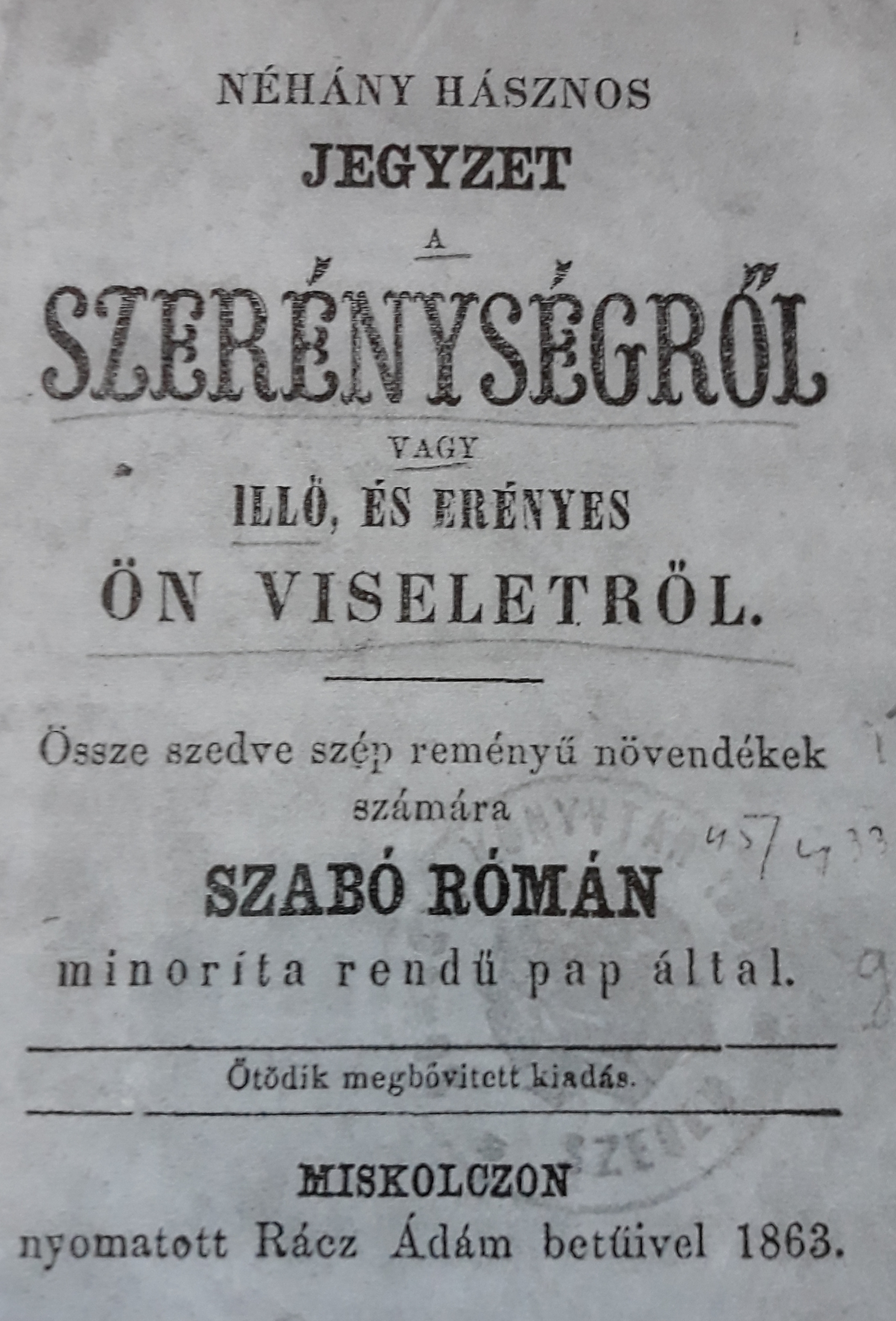 oroszhegyi